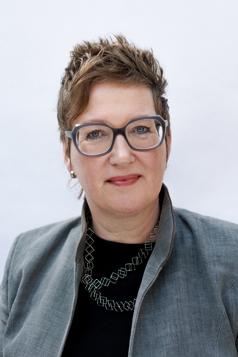 Marieke Schoenmakers